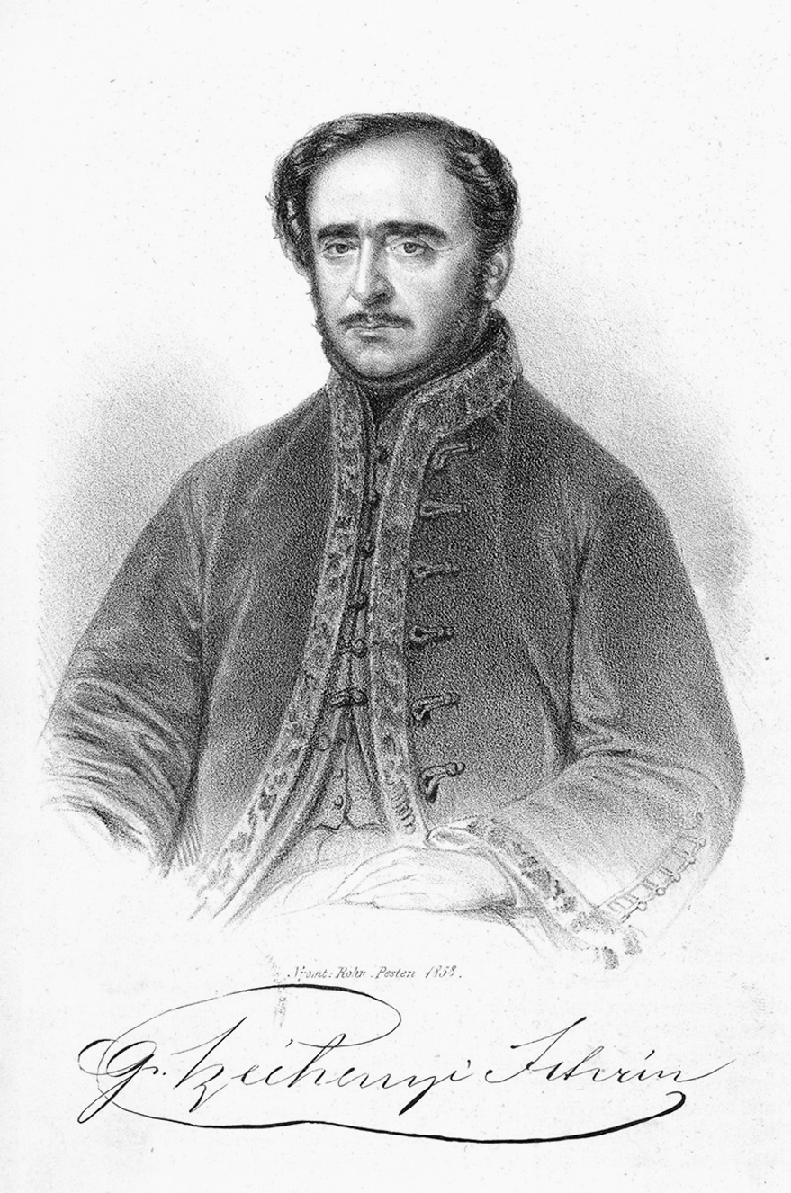 Széchenyi István (1791-1860)